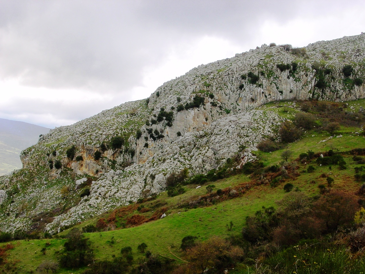 Parco dei Nebrodi, Sicily Rocche del Crasto